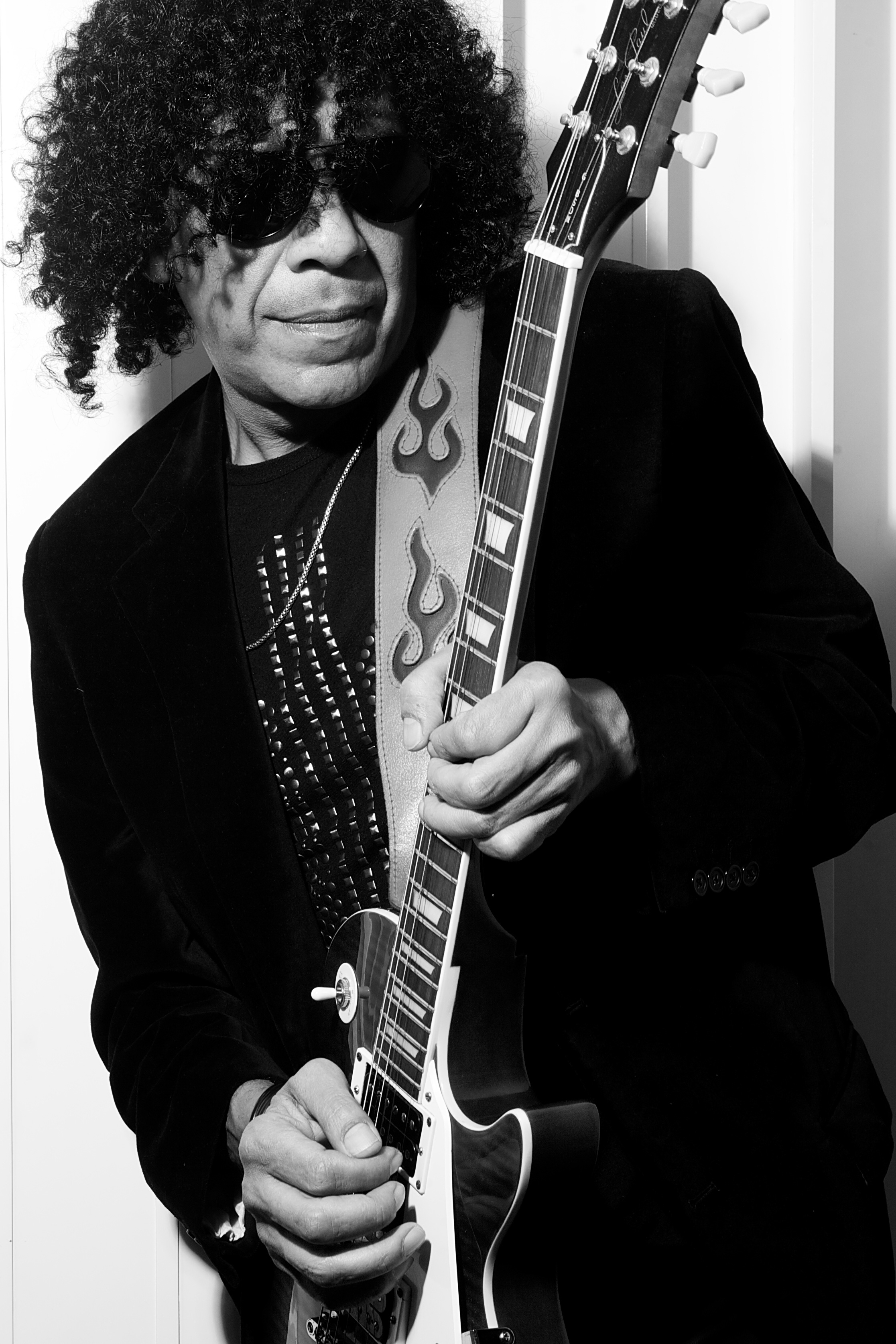 Foto de prensa de Carlos "El Negro" García López (2012) capturada por el fotógrafo Guido Adler.